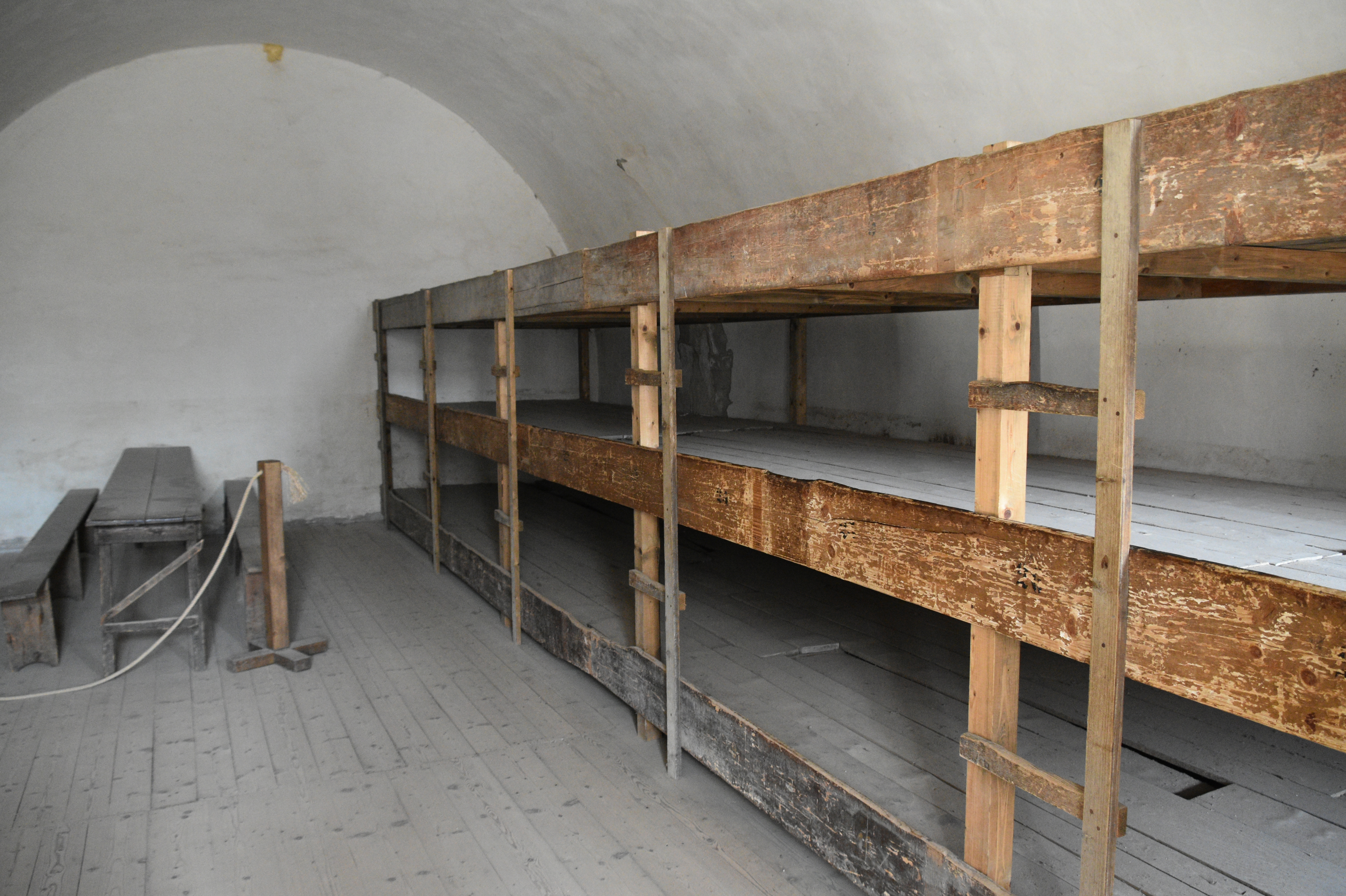 Terezin Nazi Concentration Camp (14)